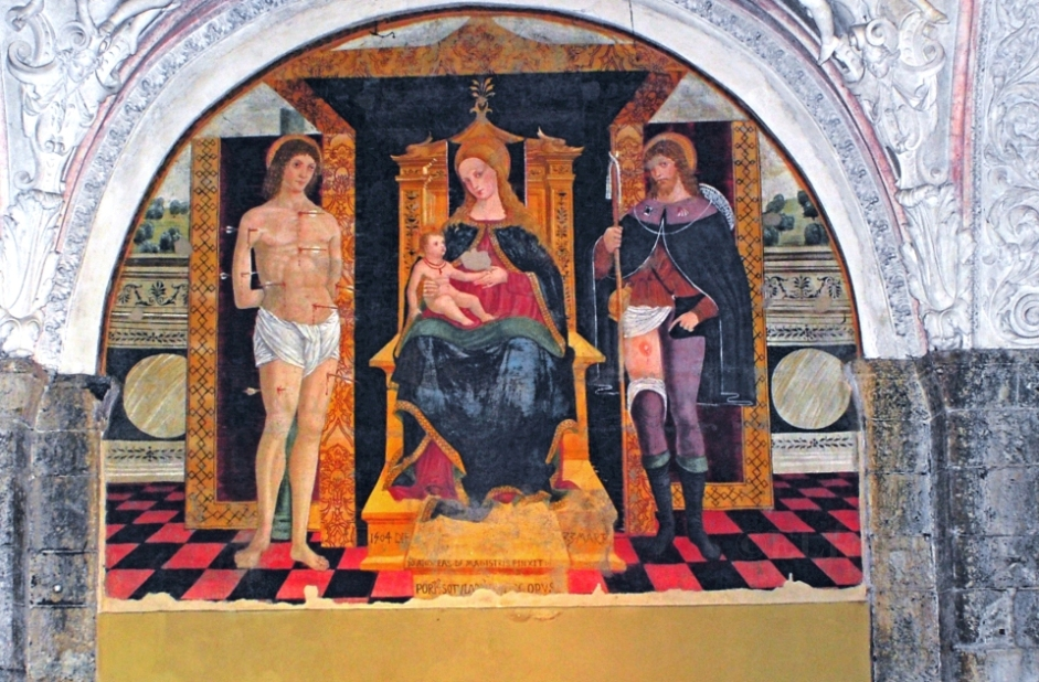 "Madonna tra i santi Sebastiano e Rocco" (1508), opera di Giovanni Antonio De Magistris